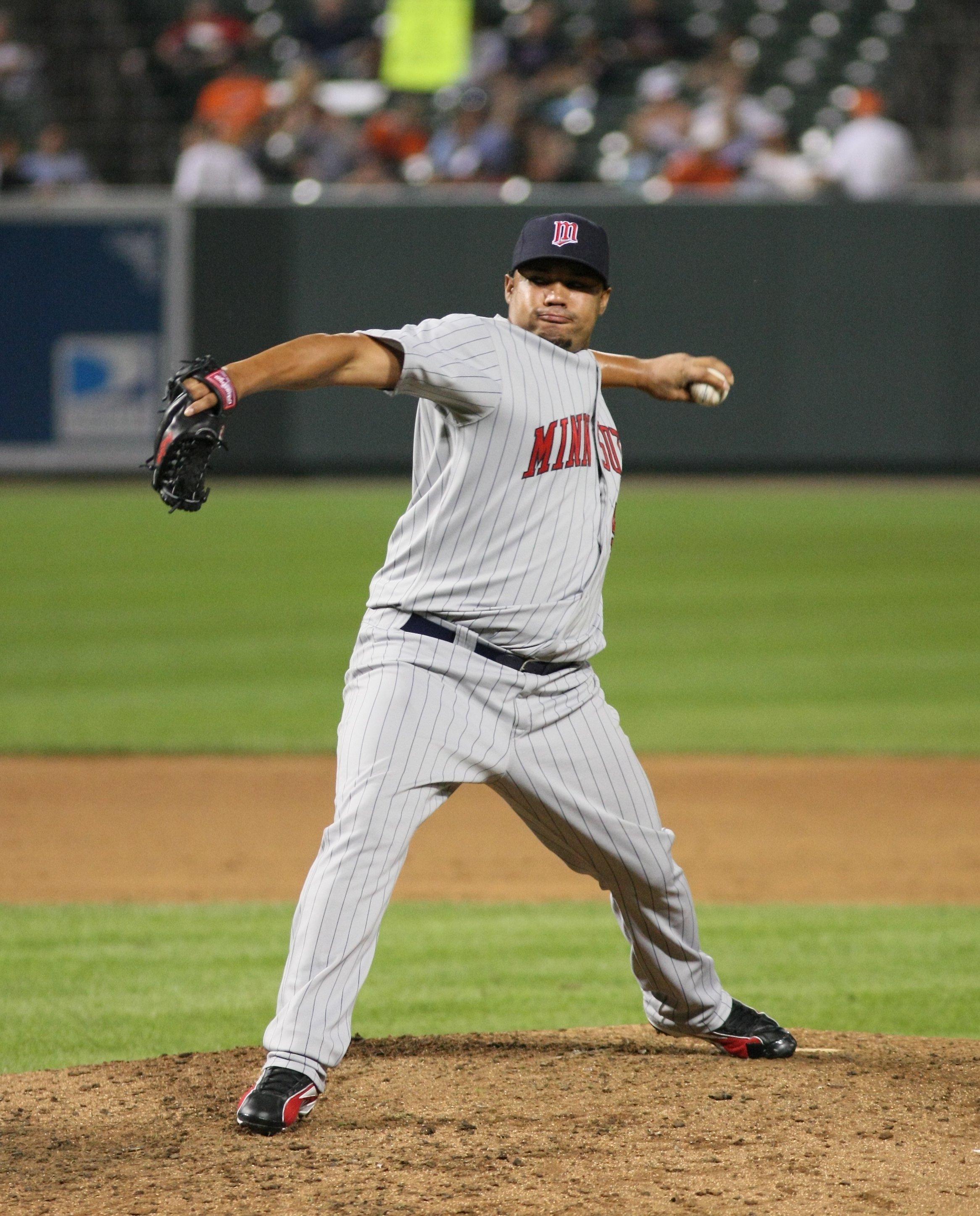 José Mijares